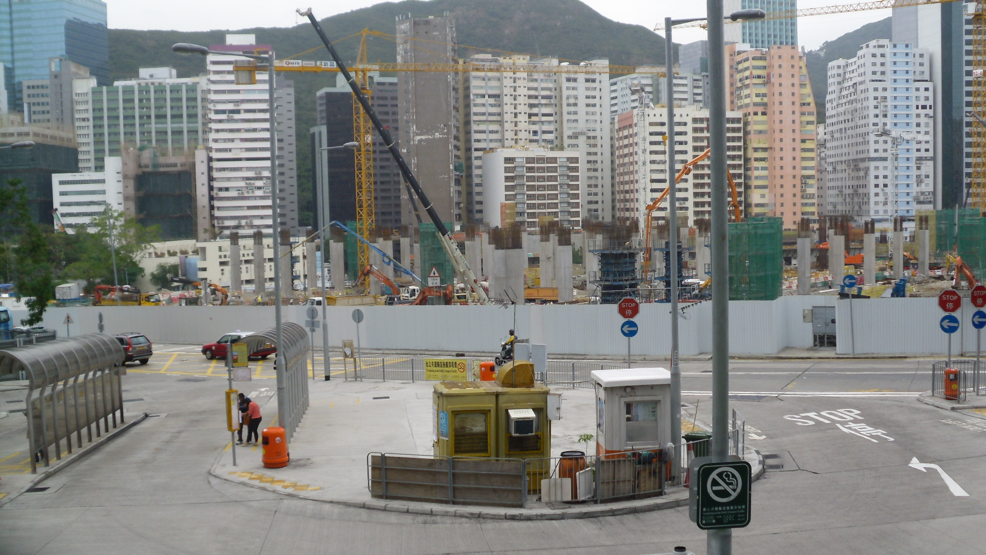 粵語: 黄竹坑站南朗山道大型建築地盤8